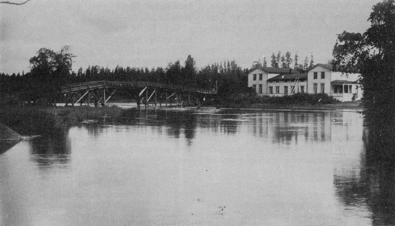 Stockfors gård huvudbyggnad 1913 Pyttis (Pyhtää)